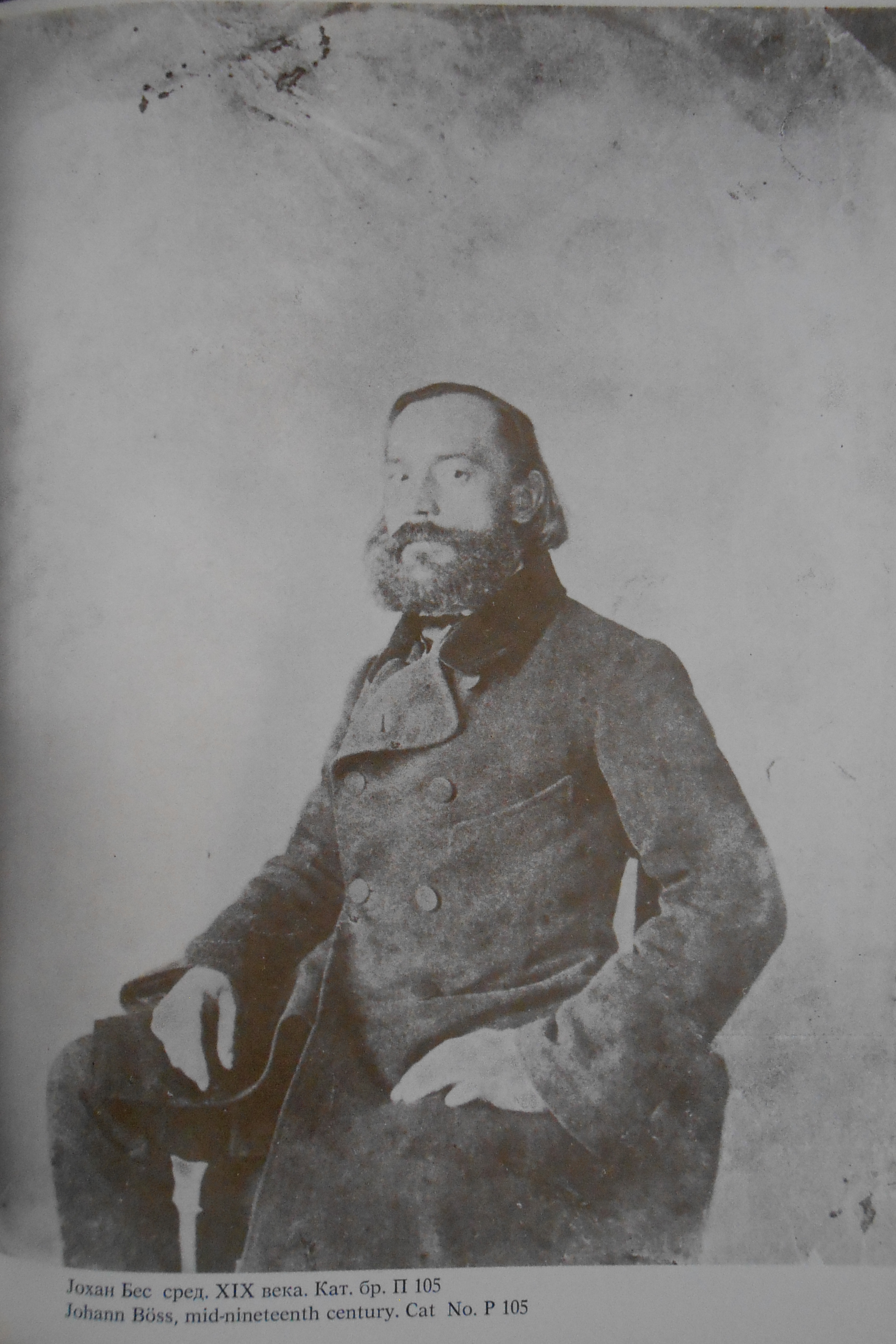 Јохан Бес талботипија Анастаса Јовановића око 1850. Музеј града Београда.